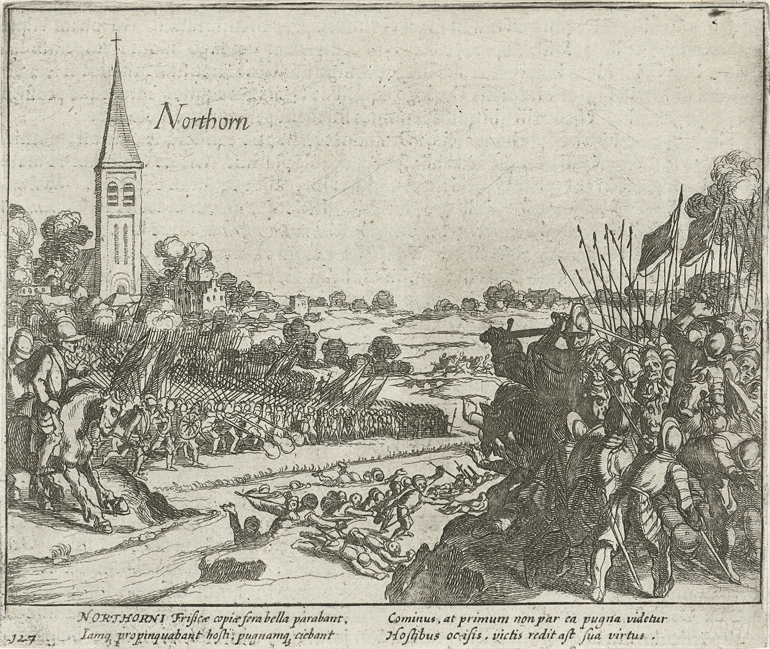 Het Staatse leger bij Nordhorn (Duitsland) verslagen door de Spaanse troepen onder Verdugo, 16 september 1581. Hevige gevechten bij een rivier, links wat naar achteren de kerktoren van Nordhorn. Met onderschrift van 4 regels in het Latijn. Genummerd 127. Bedrukt op achterzijde met tekst in het Latijn.